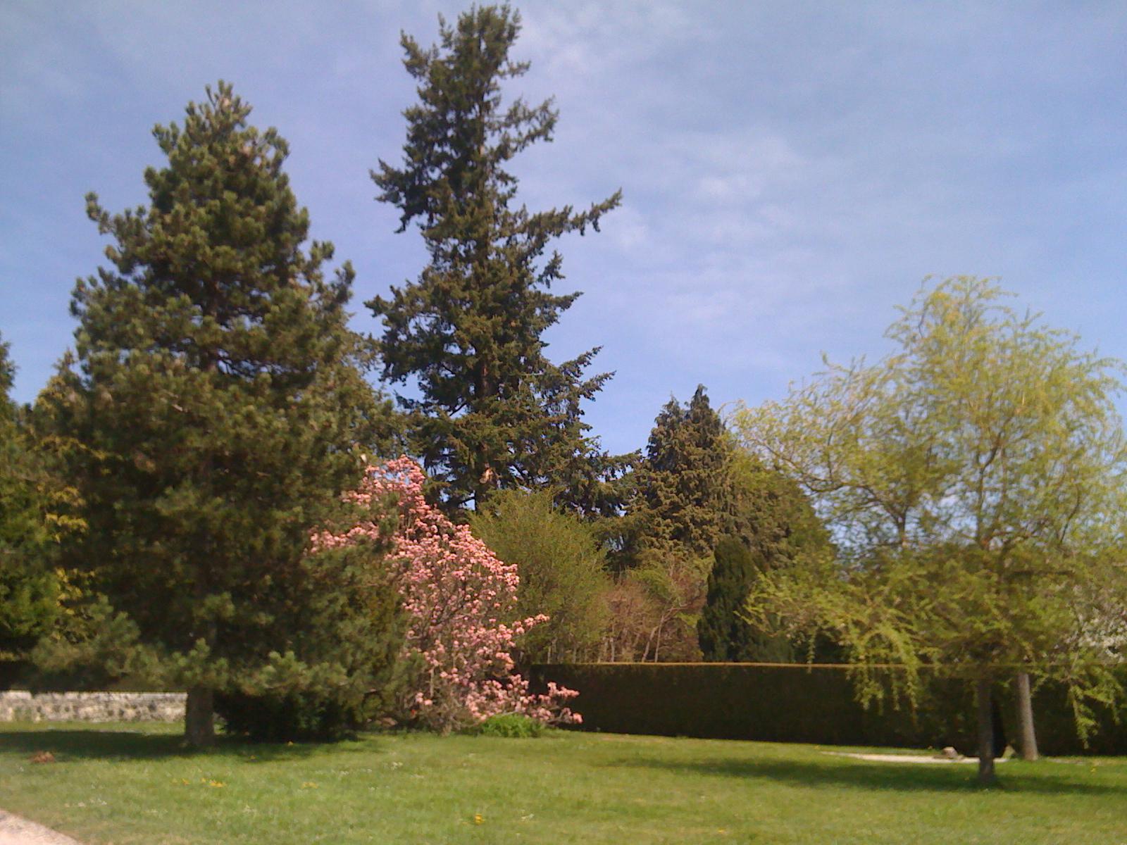 Jardins du château de carbonat